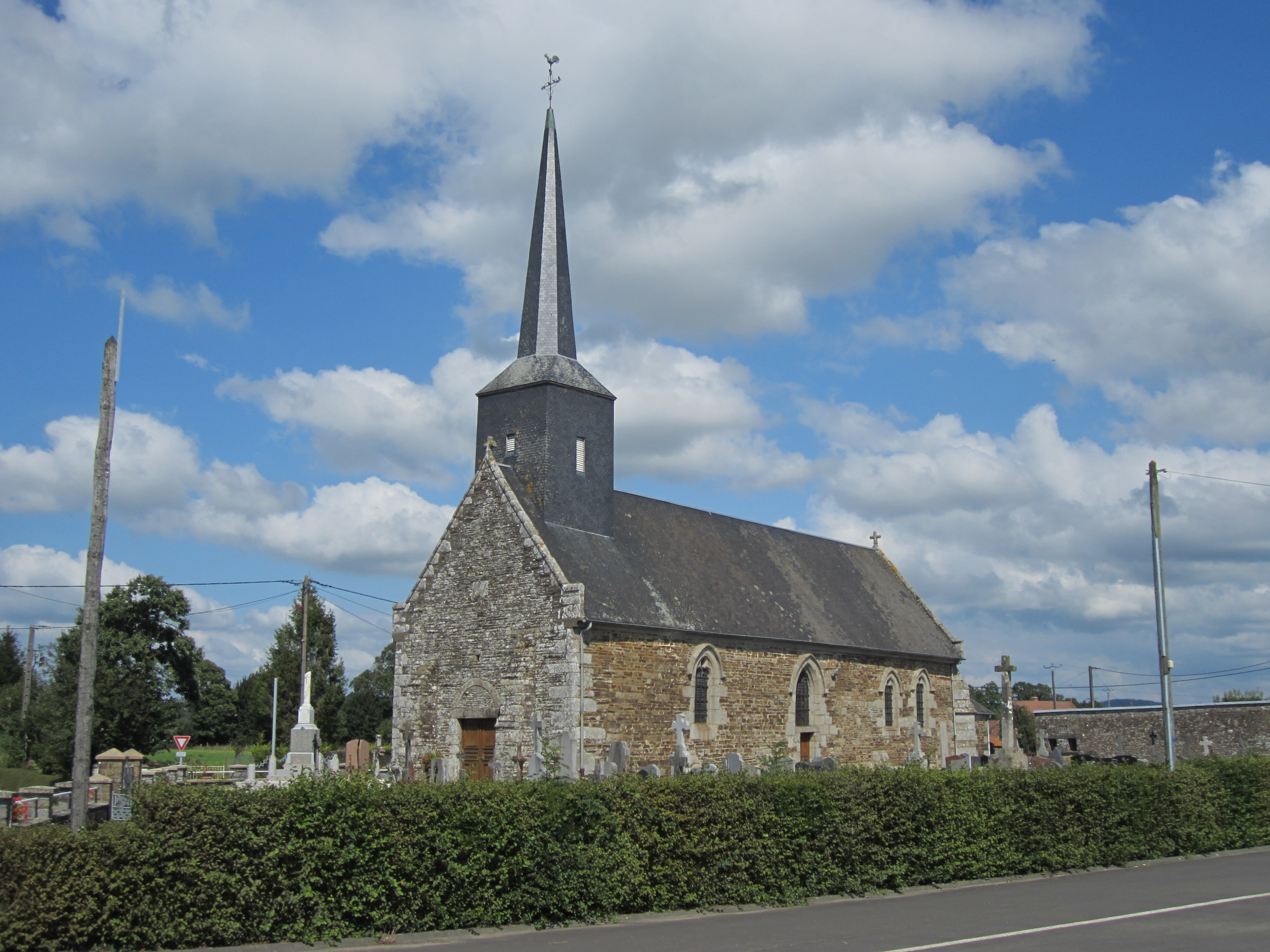 Fontenay, Manche